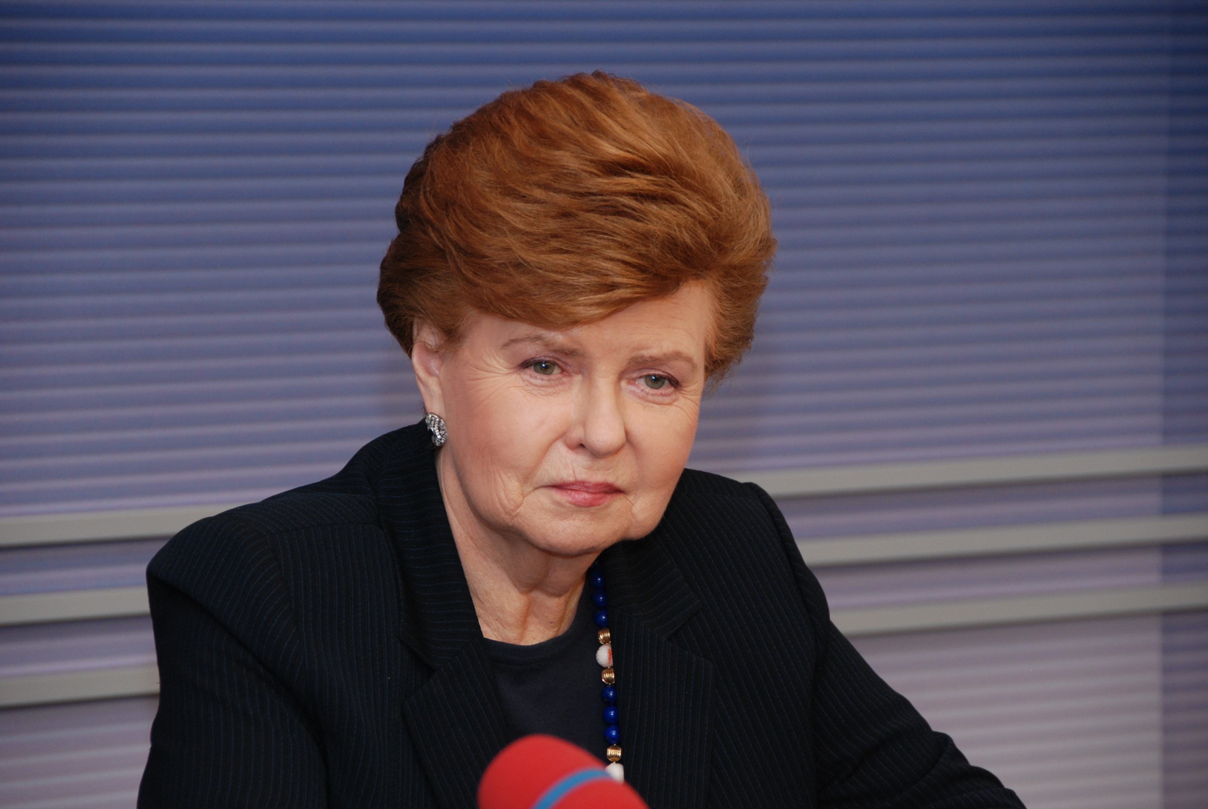 Eksprezidente Vaira Vīķe-Freiberga